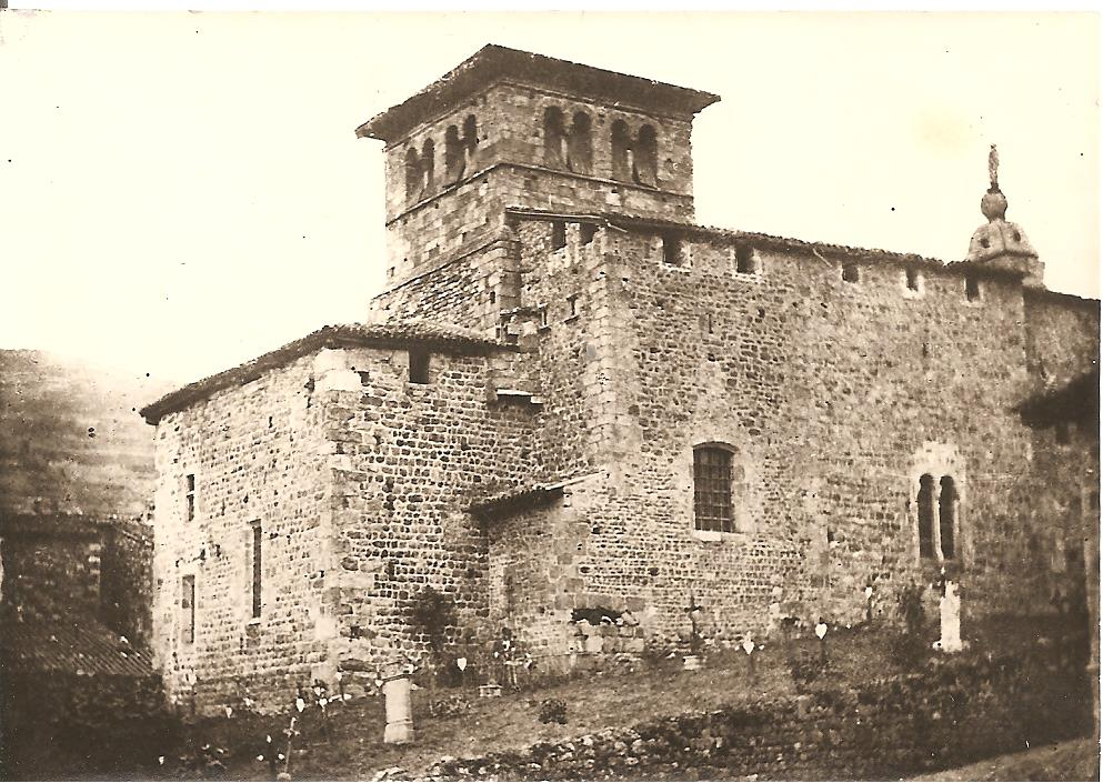 Vu du bas du Cretel